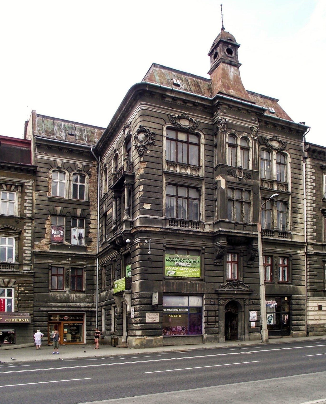 Bielsko-Biała, ul. 3 Maja 5.